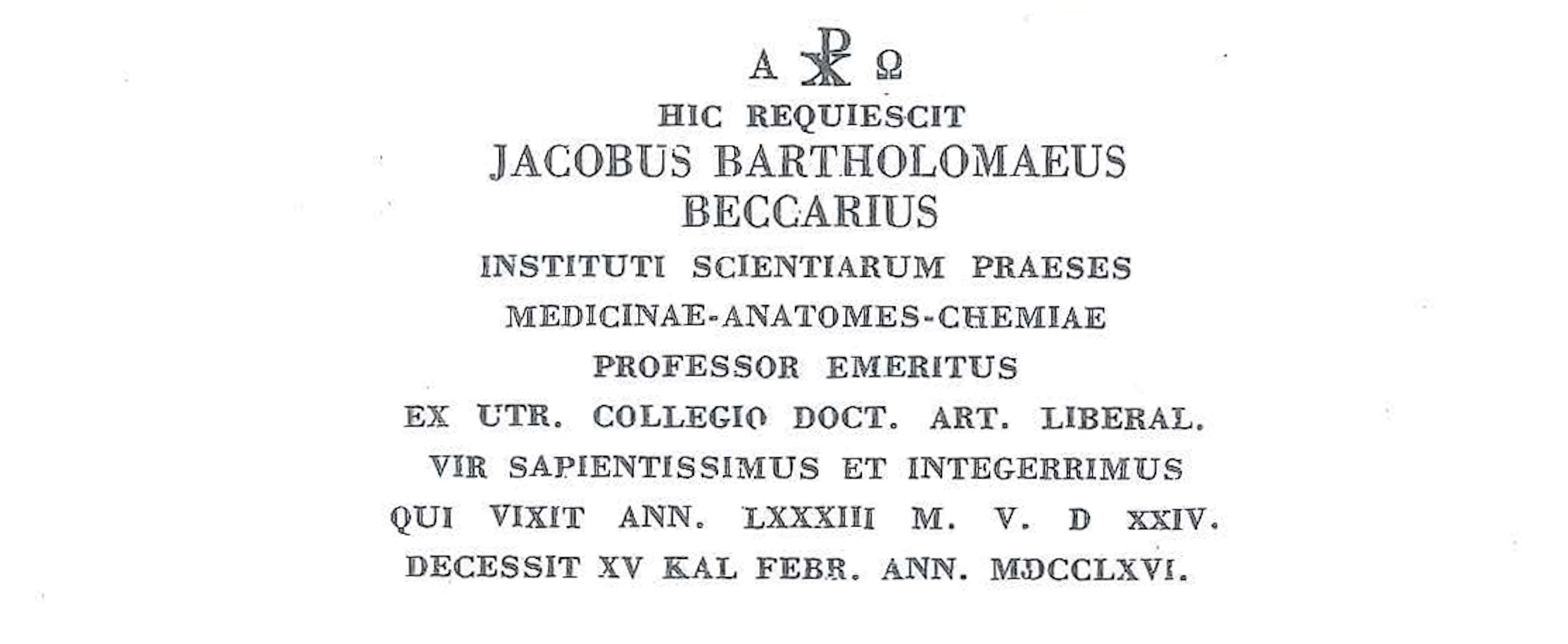 Epigrafe sulla tomba di Jacopo Bartolomeo Beccari da Giovanni Pini, "Jacopo Bartolomeo Beccari", Licitino Cappelli, Bologna 1940